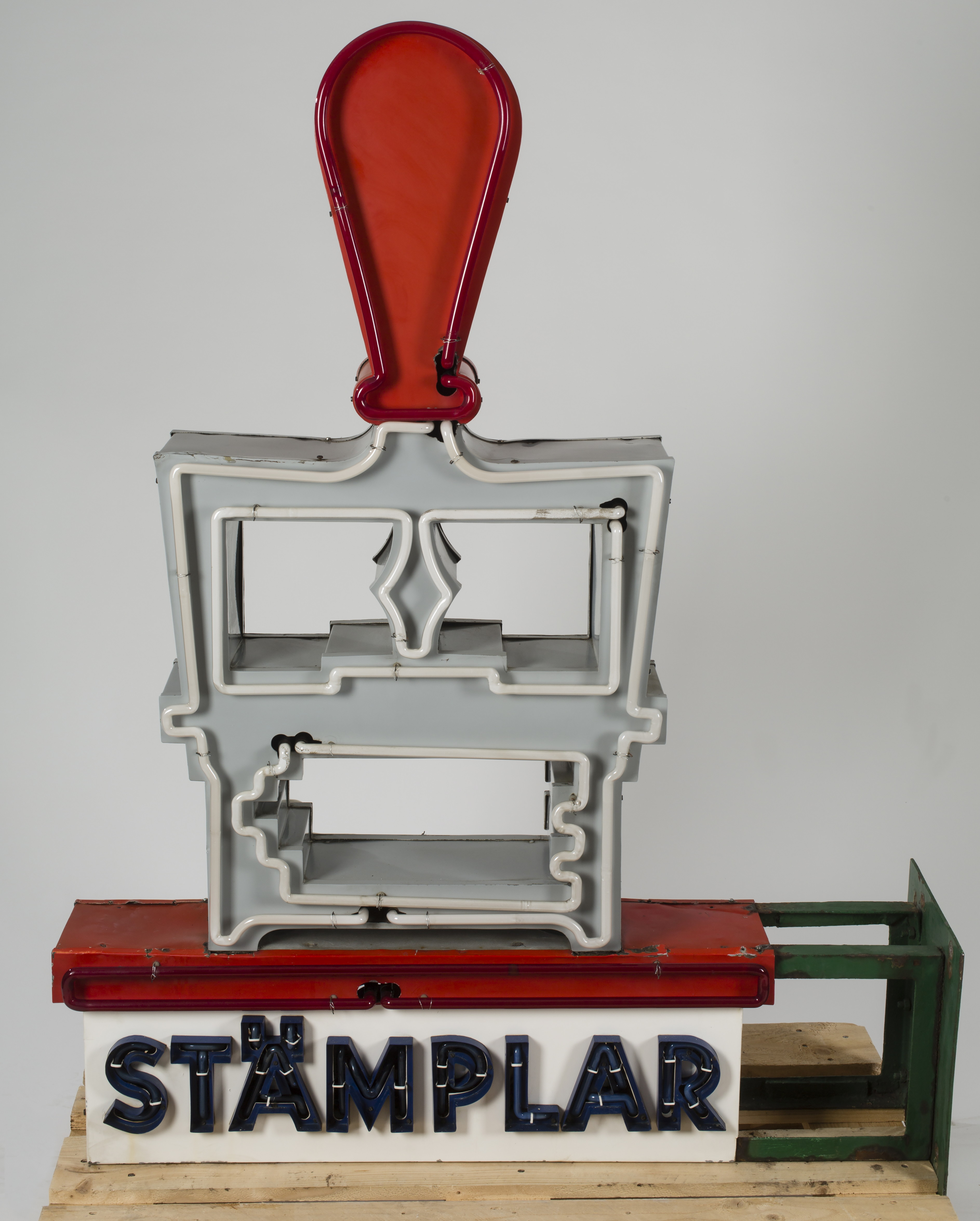 Neonskylt STÄMLAR för Stockholms stämpelfabrik som suttit på Essellte-huset (Vasagatan)